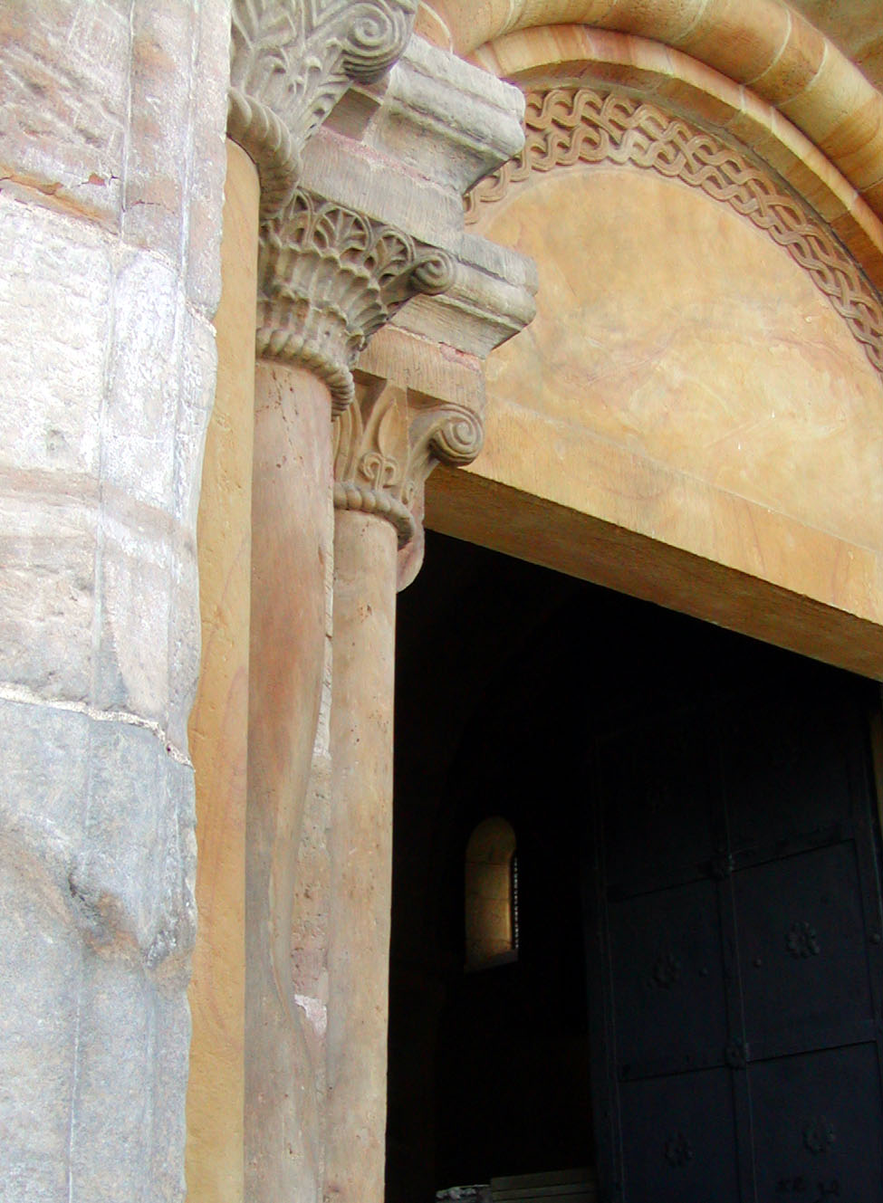 Sulejów Monastery